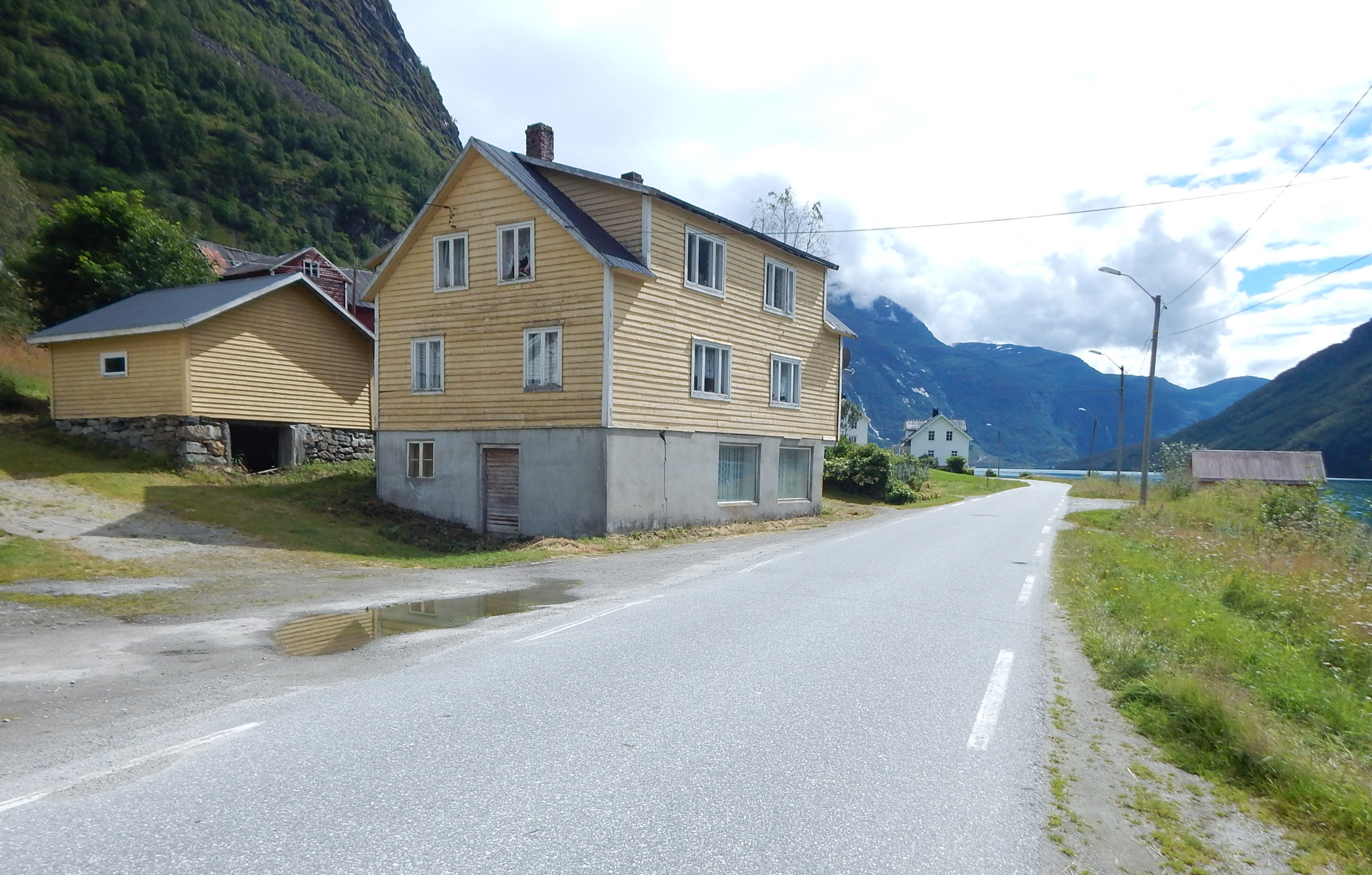 Veitastrond